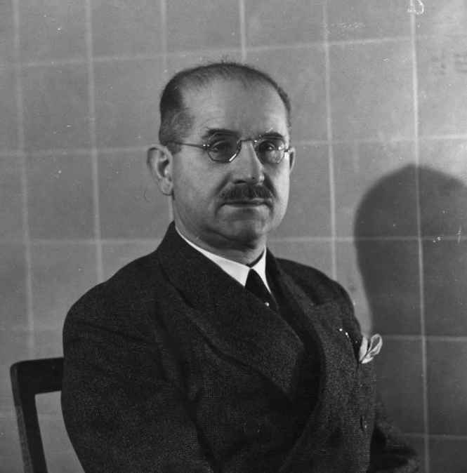 Michał Franciszek Kwiatkowski.